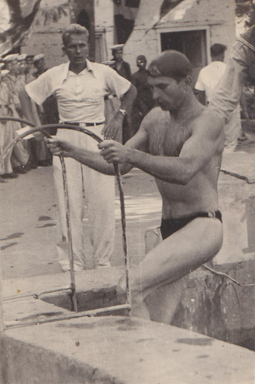 Ушаков Виталий - чемпион СССР за 1947 г. по вольному стилю